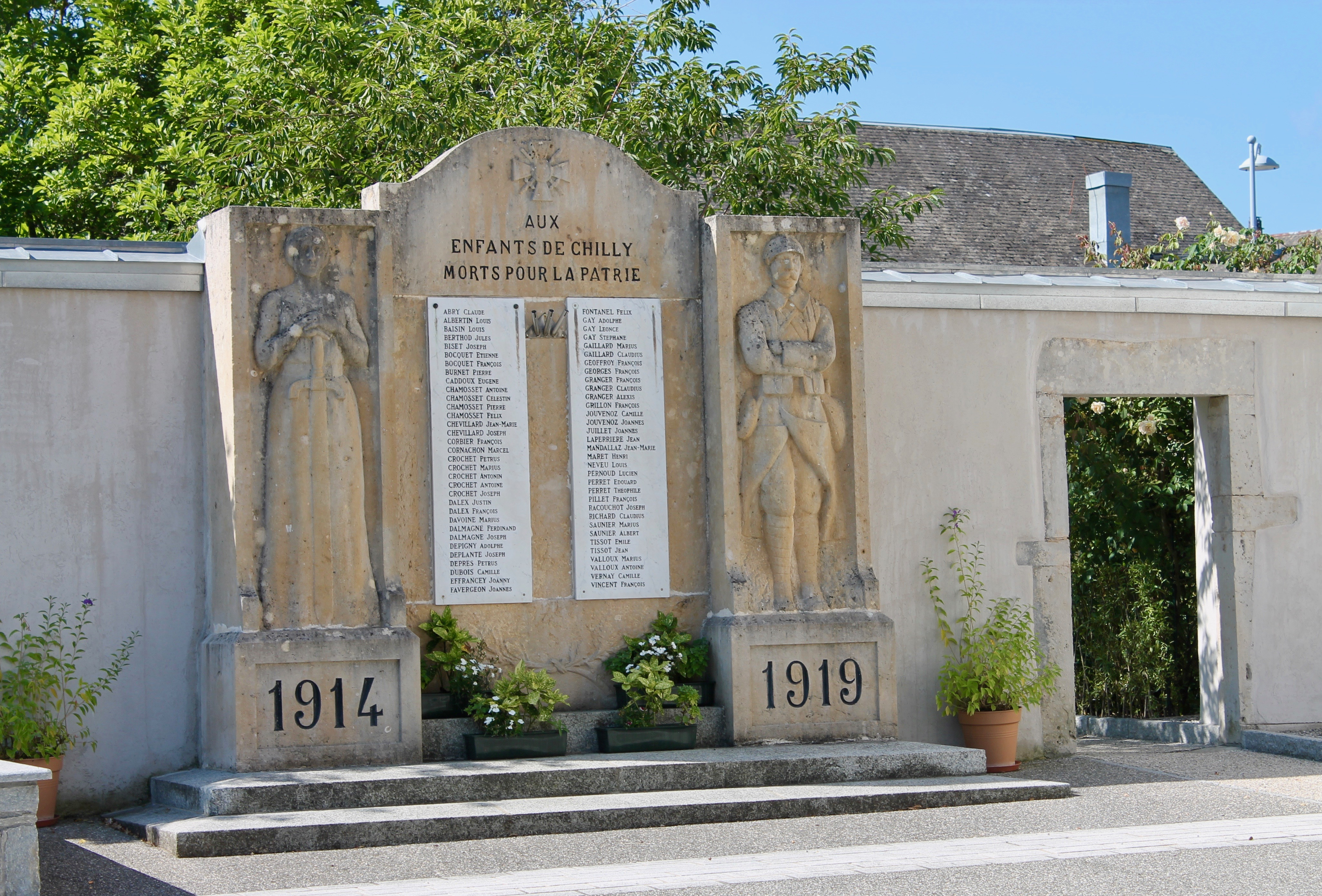 Monument aux Morts de la commune française de Chilly (Haute-Savoie).